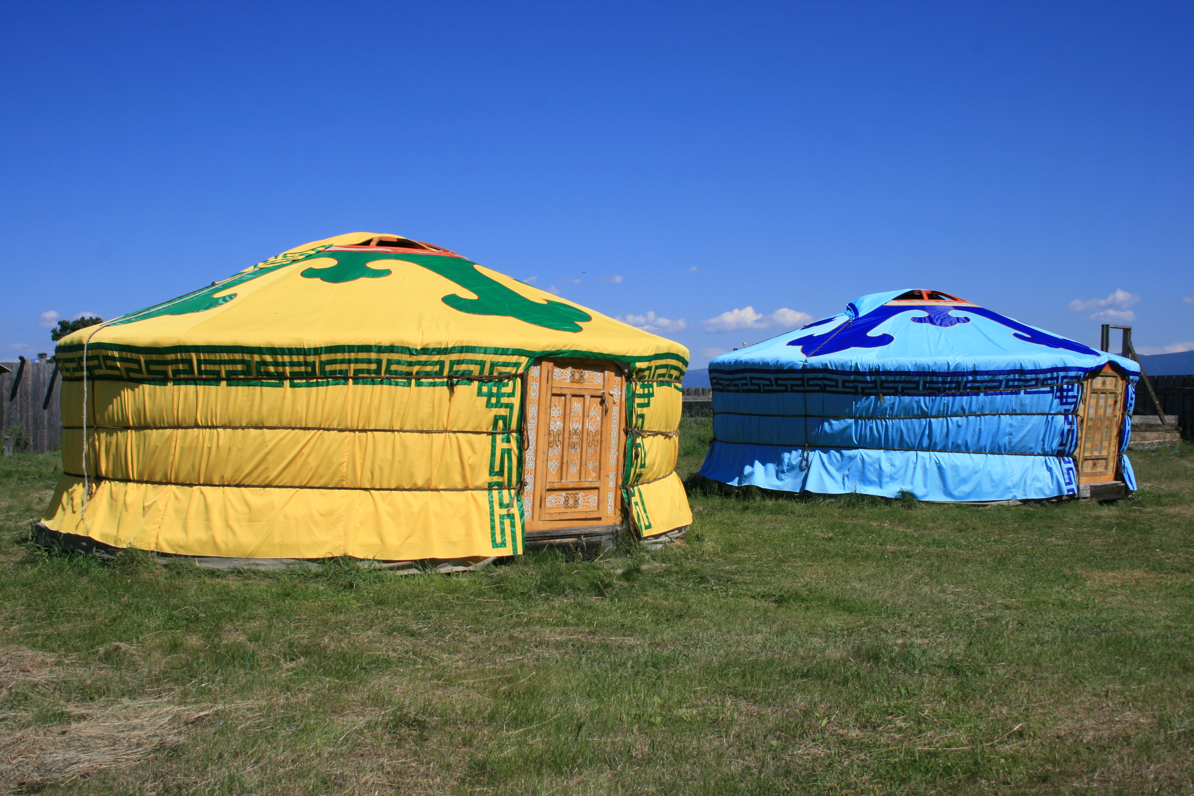 Бурятские юрты в деревне Катунь, Чивыркуйский залив